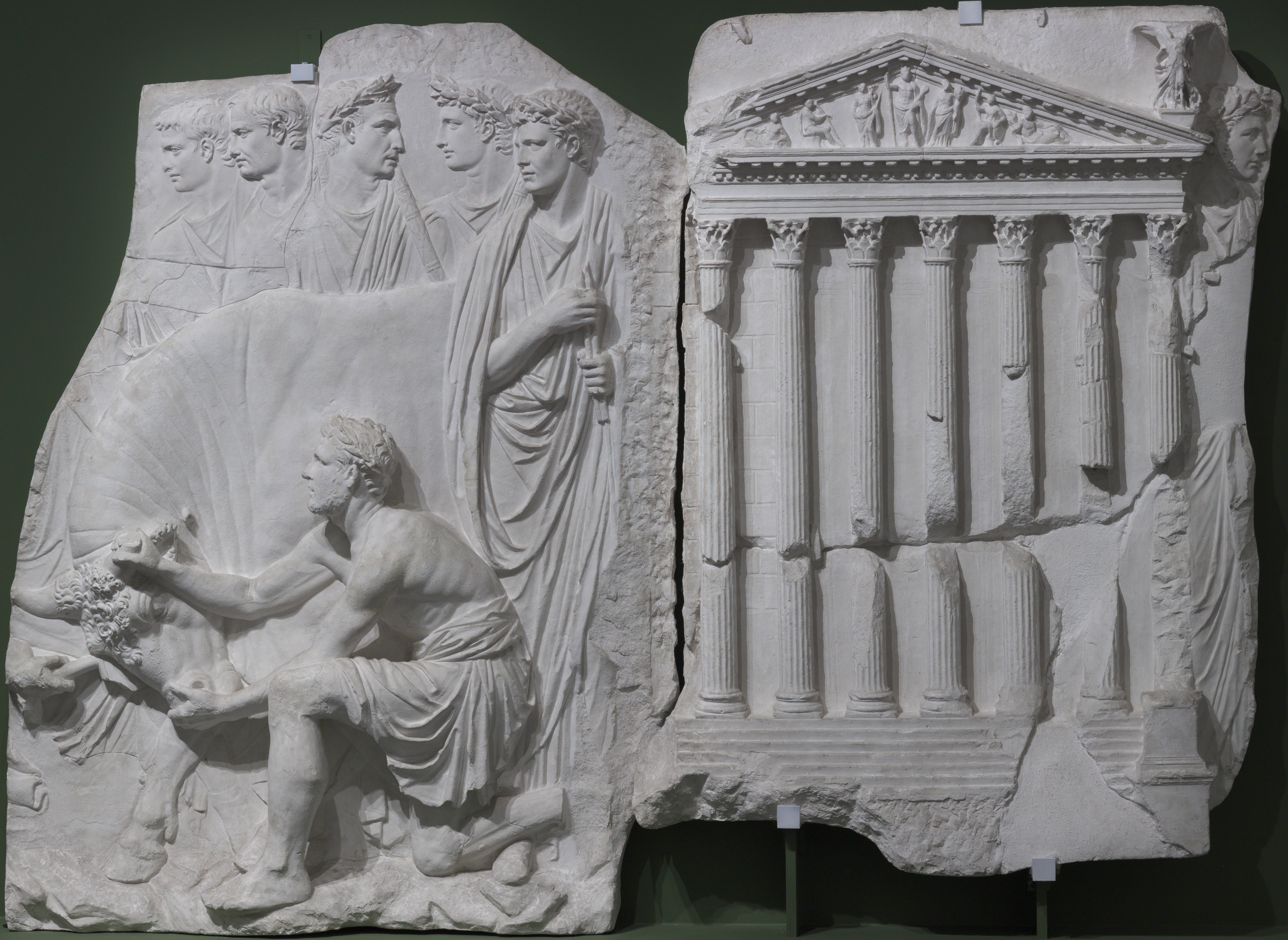 Scène de sacrifice devant le temple de Mars Ultor sur le Forum d'Auguste, moulages d'originaux découverts à Rome, près de l'église Santa Maria in Via Lata en 1583. Originaux intégrés dans la façade interne de la Villa Médicis